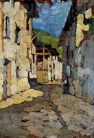 "Case di paese, olio su tela, Nervi, Galleria d'arte moderna